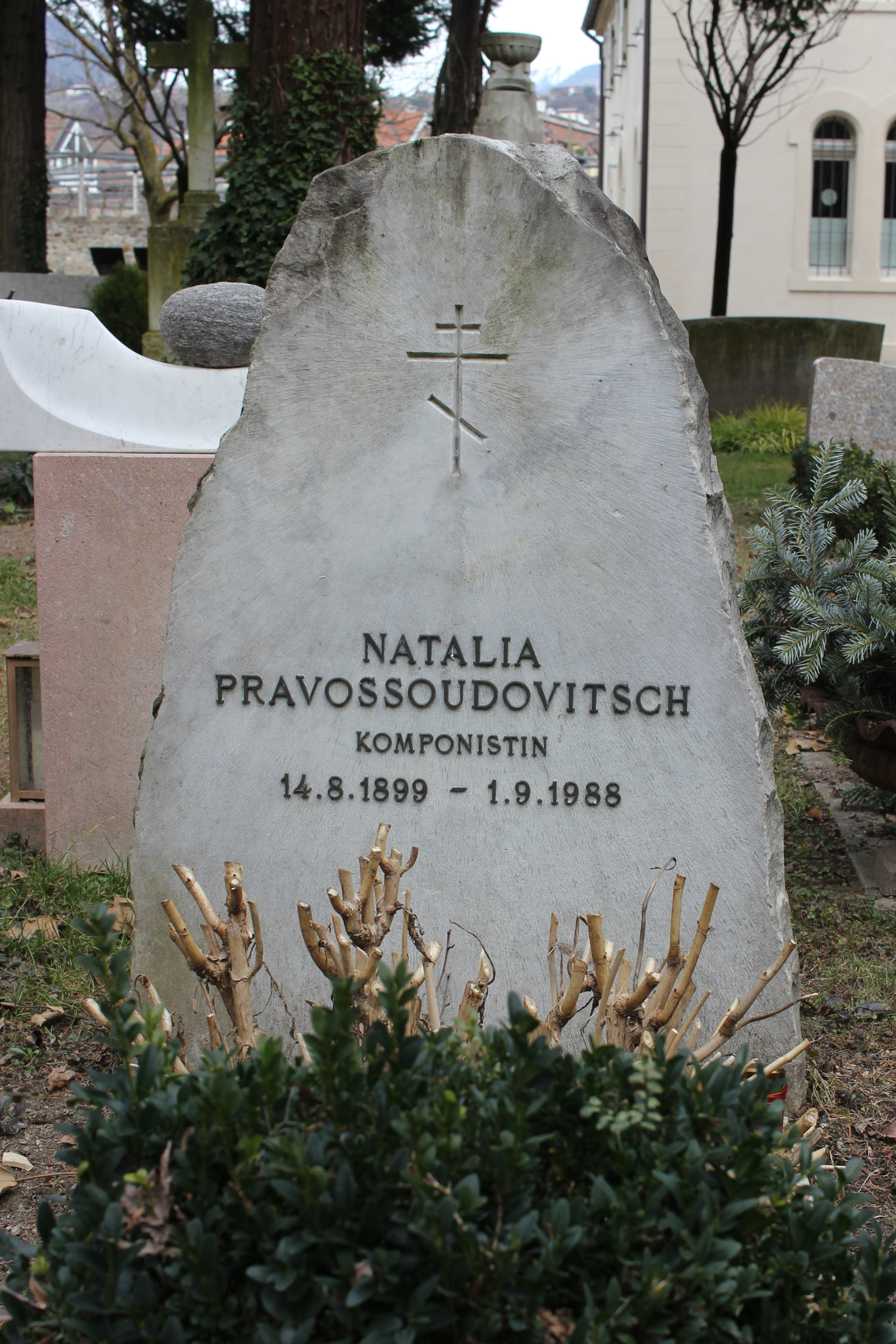 Grab von Natalja Prawossudowitsch Ev. Friedhof Meran